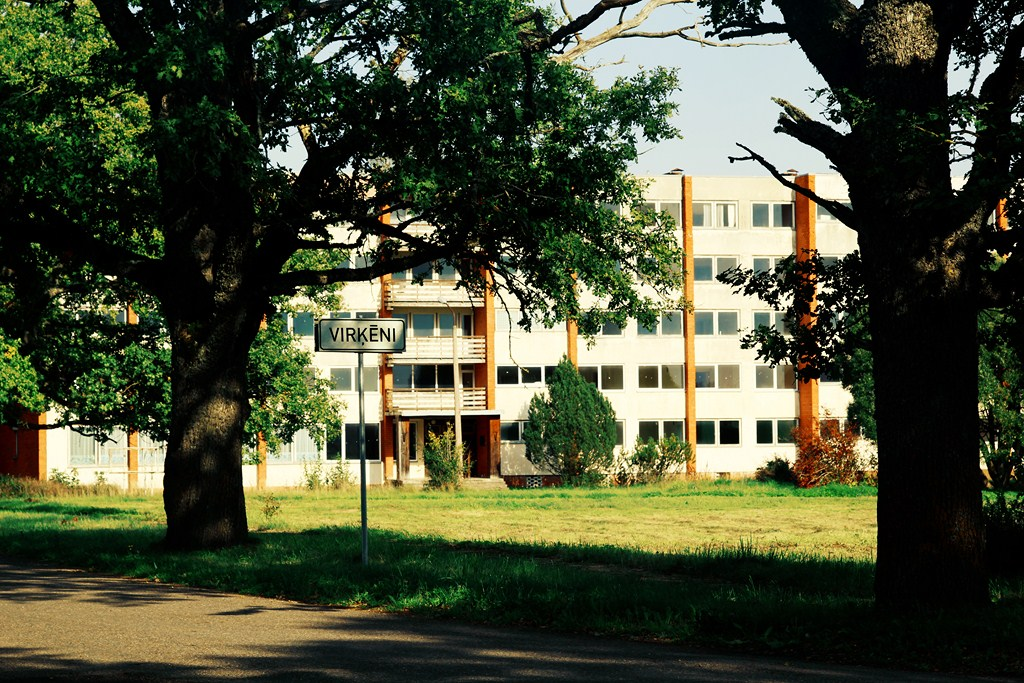 Virķēni